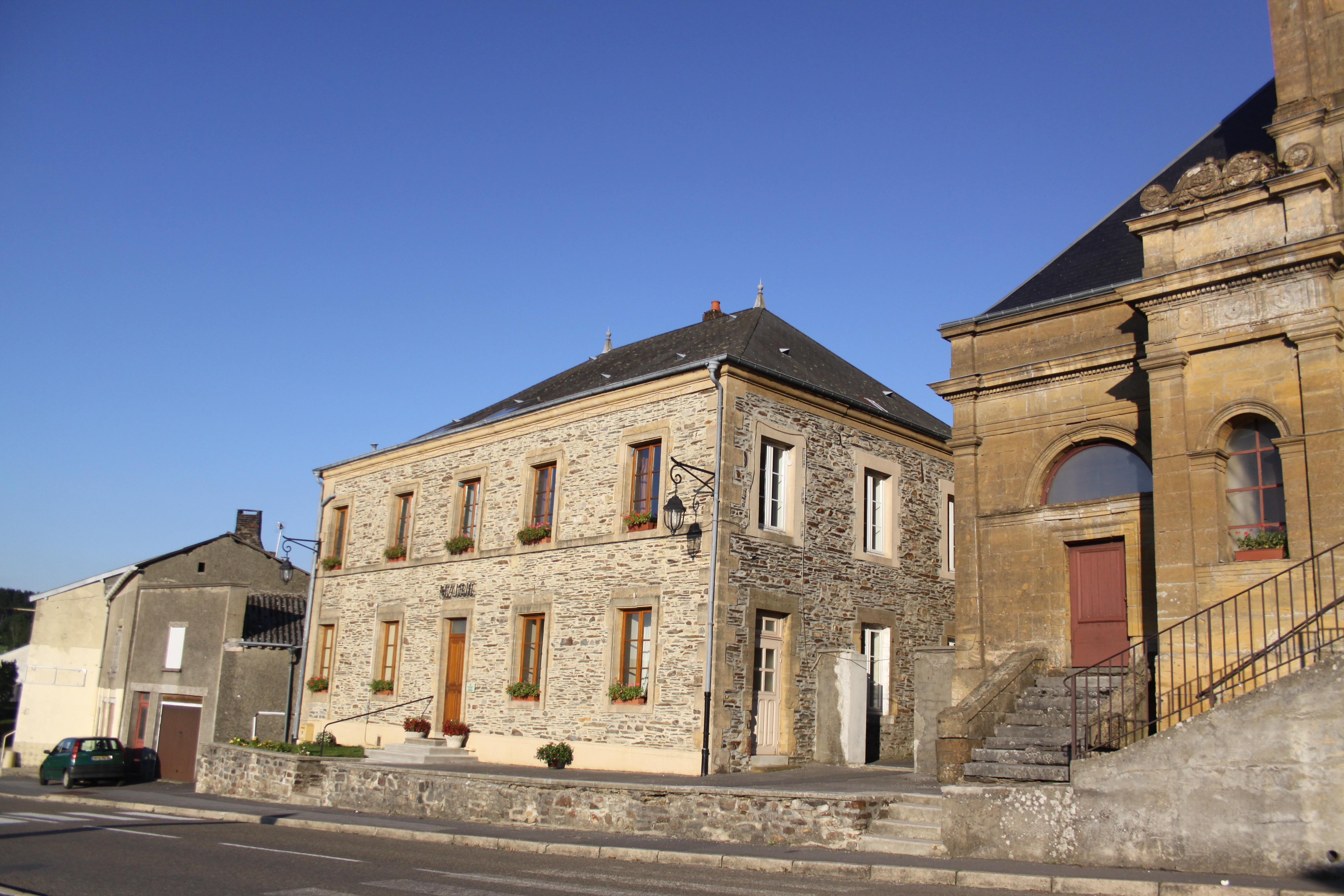 Village Ardennais